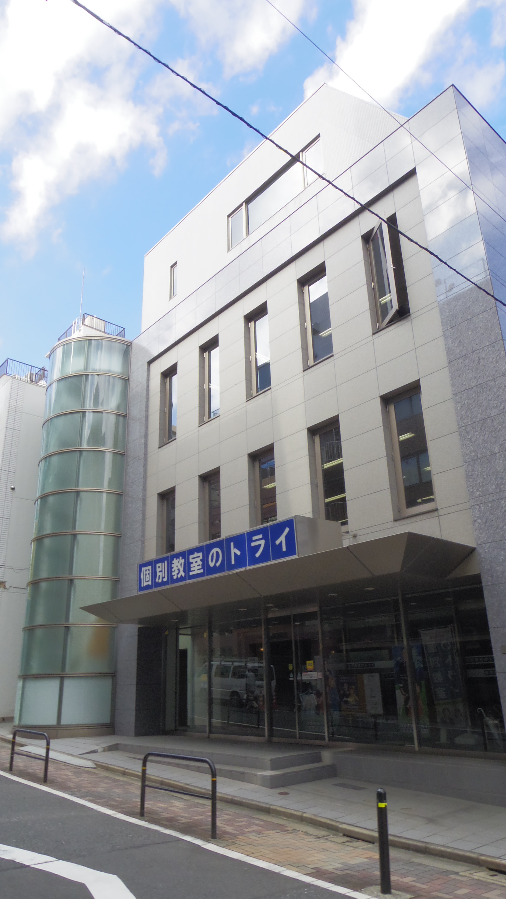 家庭教師のトライでおなじみ「株式会社トライグループ」本社ビル（東京都千代田区飯田橋）。